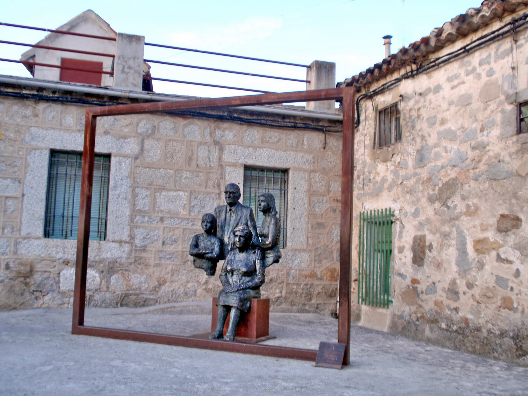 Torrelodones. Escultura Retrato de los Abuelos, situada en la Plaza de la Constitución.